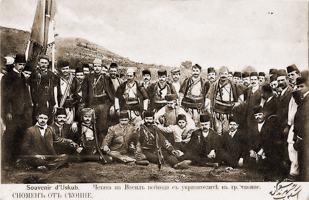 Четата на Васил Аджаларски след Младотурската революция